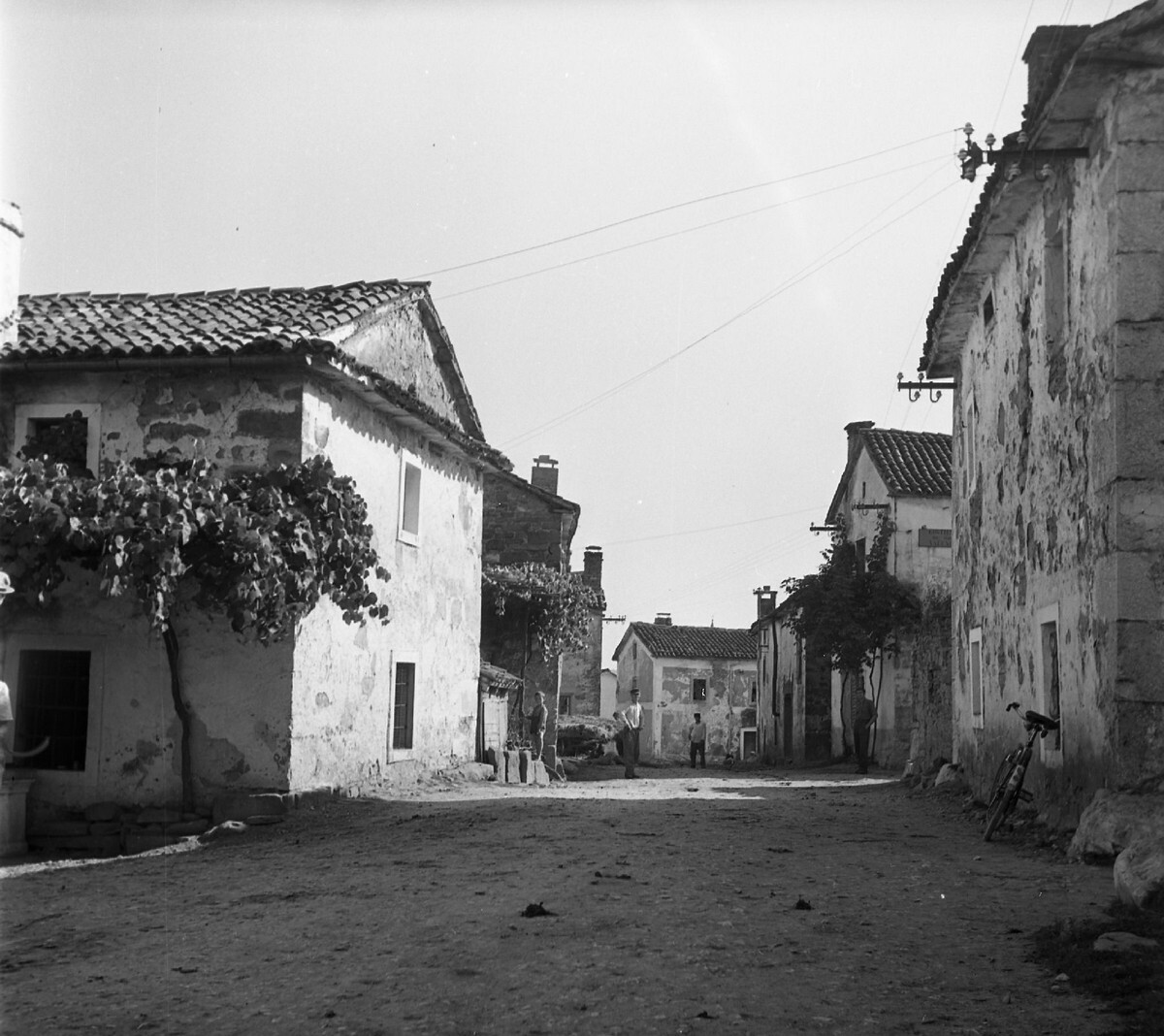 Cesta skozi vas Javorje.